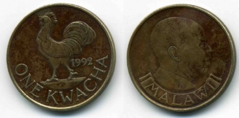 1 Malawi-Kwacha